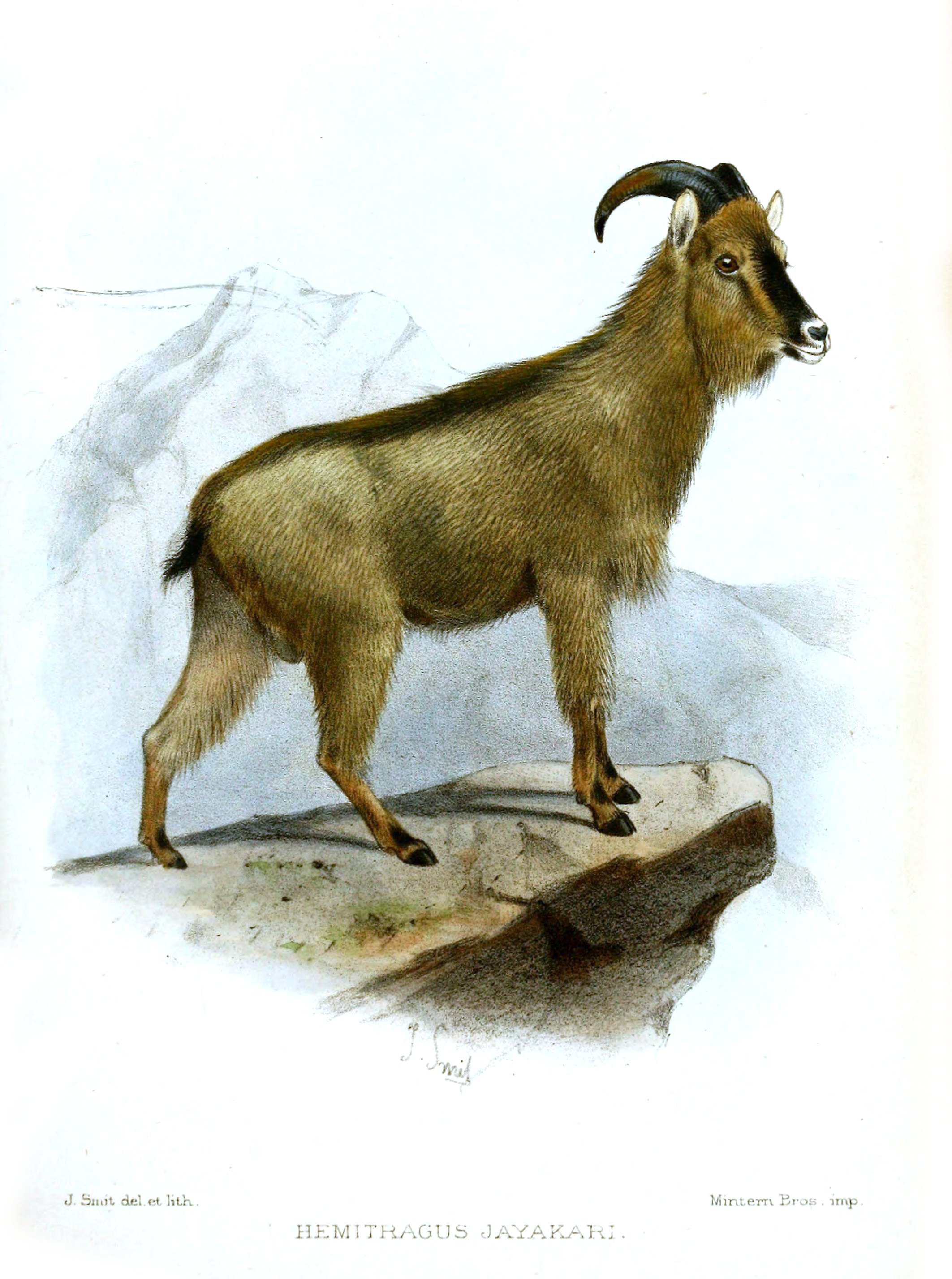 Hemitragus jayakari